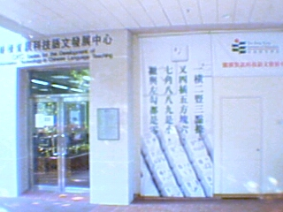 香港教育學院縱橫資訊科技語文發展中心，2004年10月15日攝。